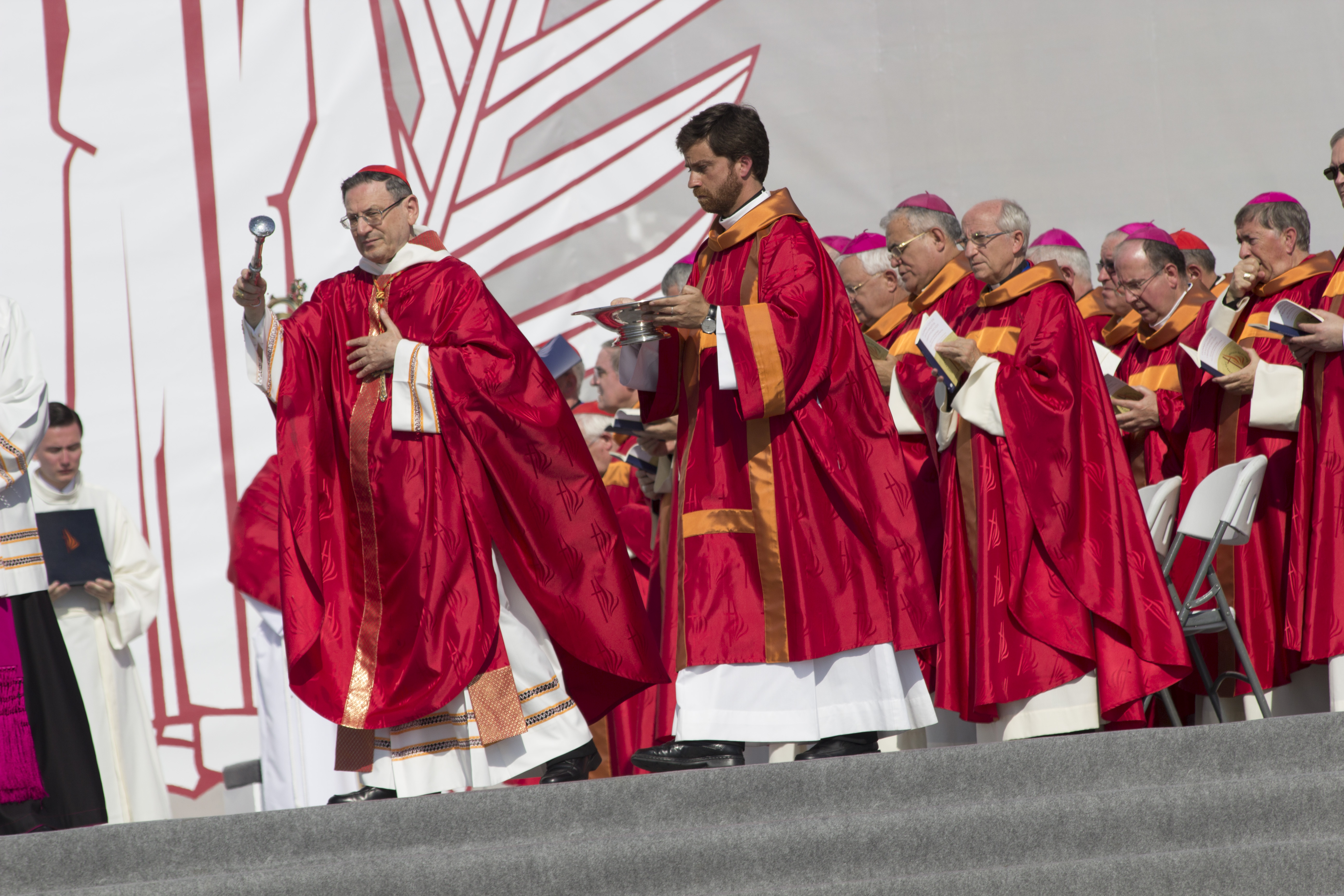 El cardenal Antelo Amato va presidir la Beatificació de 522 màrtirs que es va celebrar a Tarragona el 13 d'octubre de 2013.